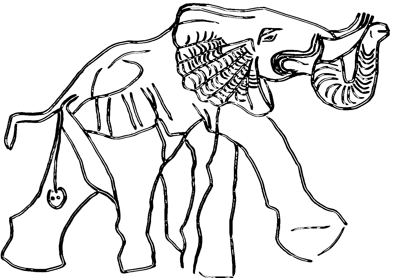 Tassili n'Ajjer, Elefante grabado en la roca